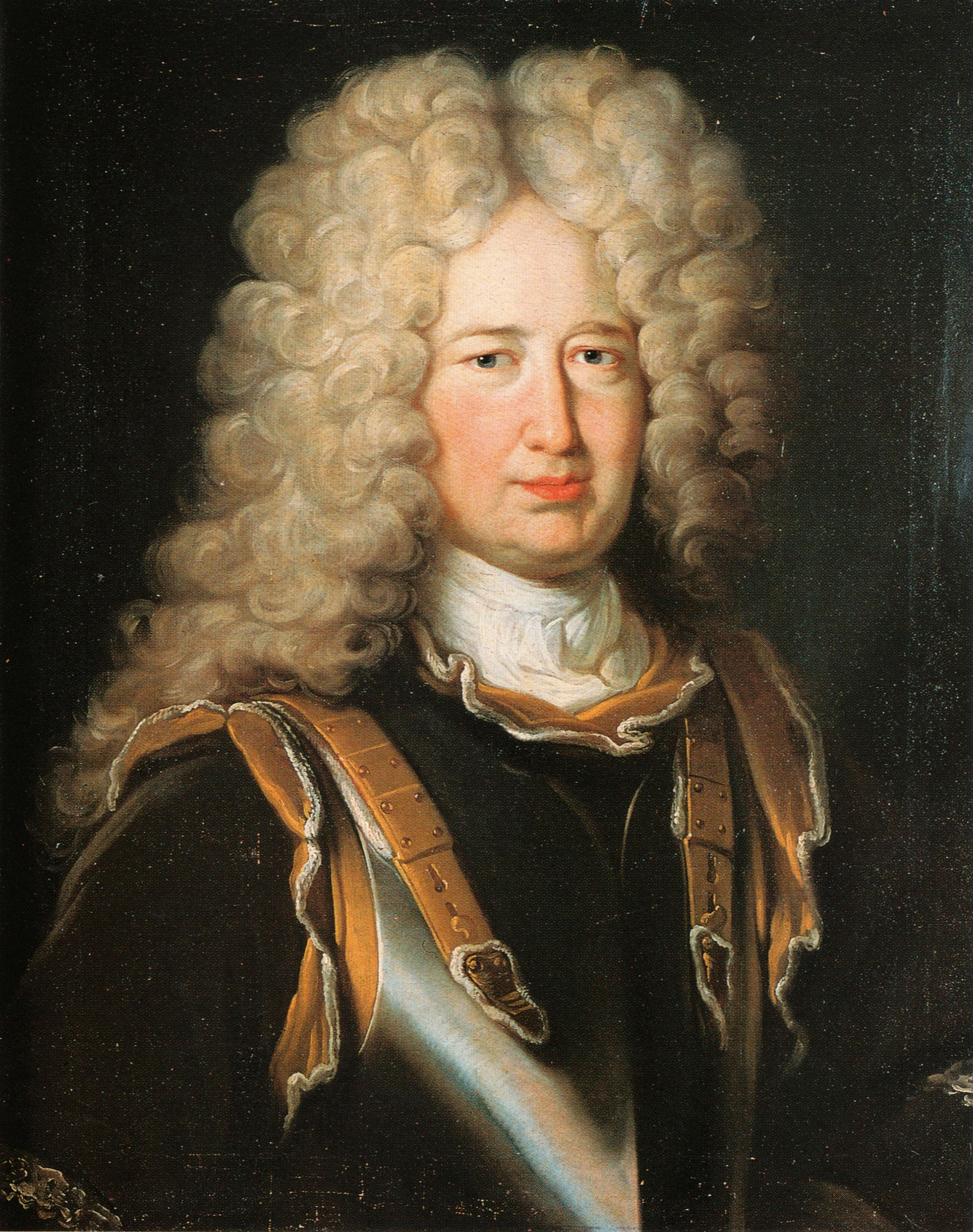 Ernst von Metternich (1657-1727), preussischer Ambassador in der Schweiz, Gouverneur von Neuenburg.